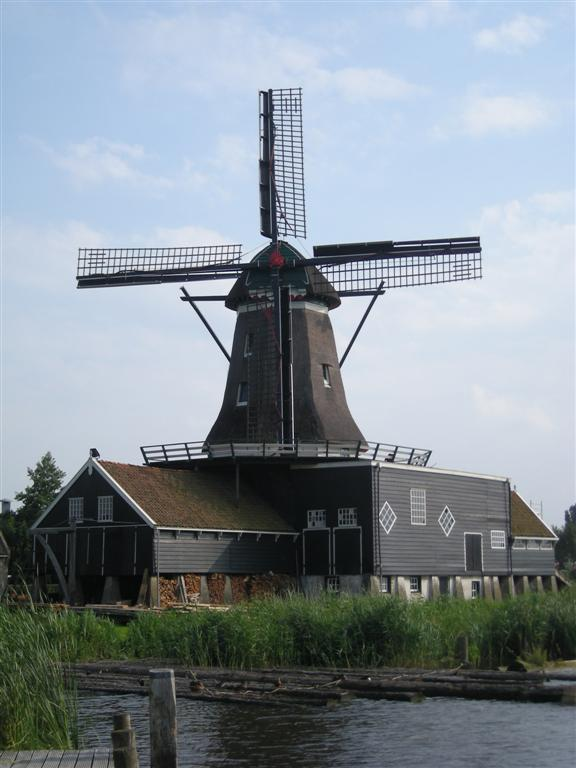 De Rat, windmolen in IJlst